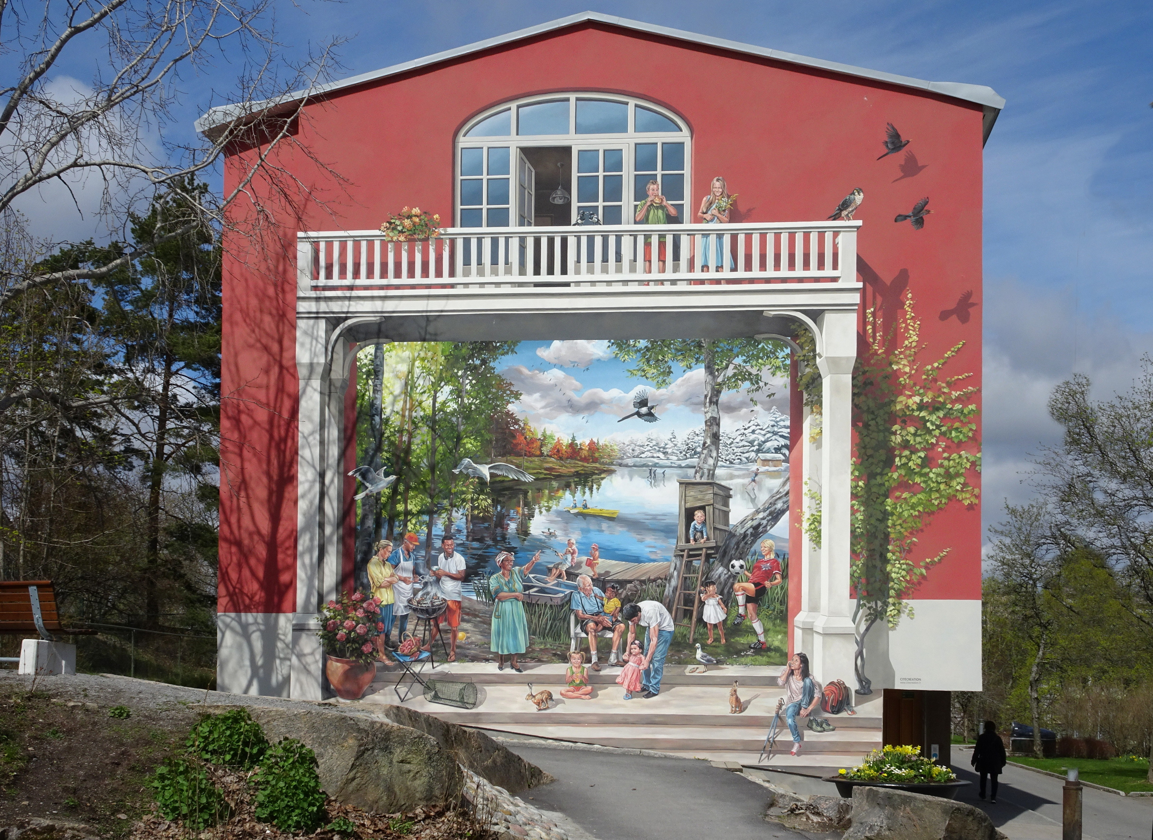 Hörnet Ullerydsbacken/Brunskogsbacken, Farsta strand, muralmålning av det franska konstnärskooperativet CitéCréation